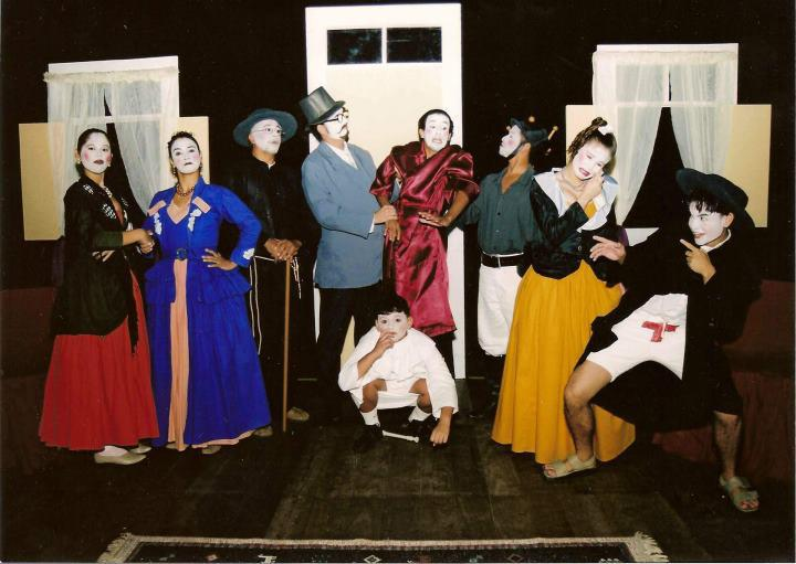 O GRUPO encenação cultural do Pará no CCBEU